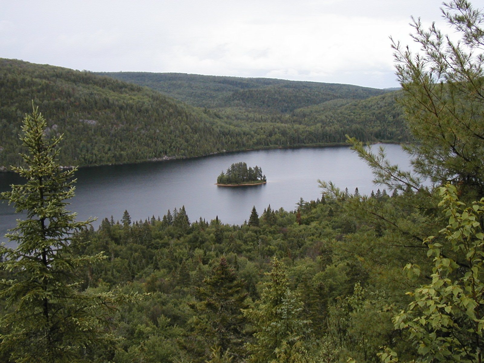 Île aux pins, parc de la Mauricie, Québec, Canada